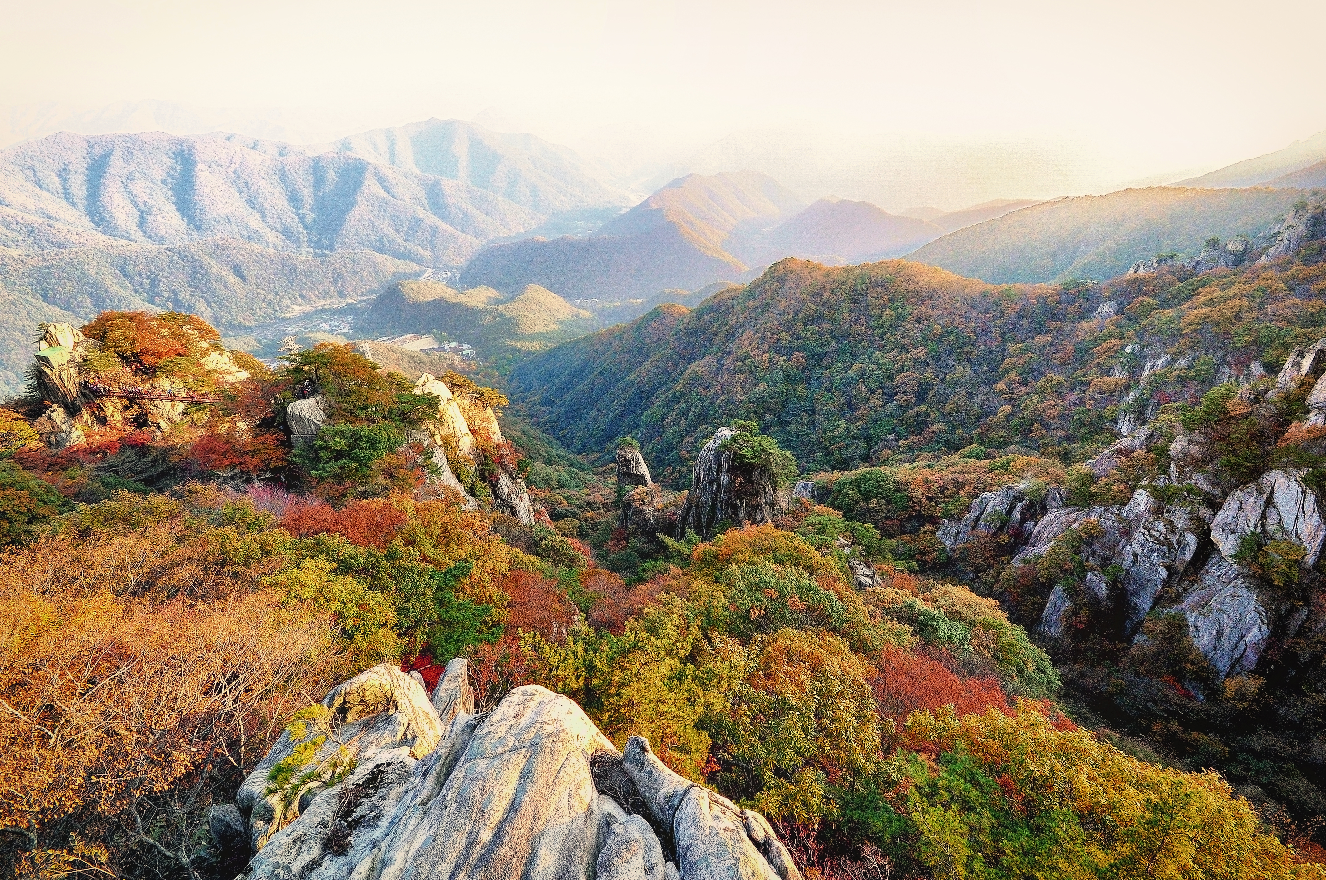 한국어 (조선): 아름다운 대둔산의 가을 단풍